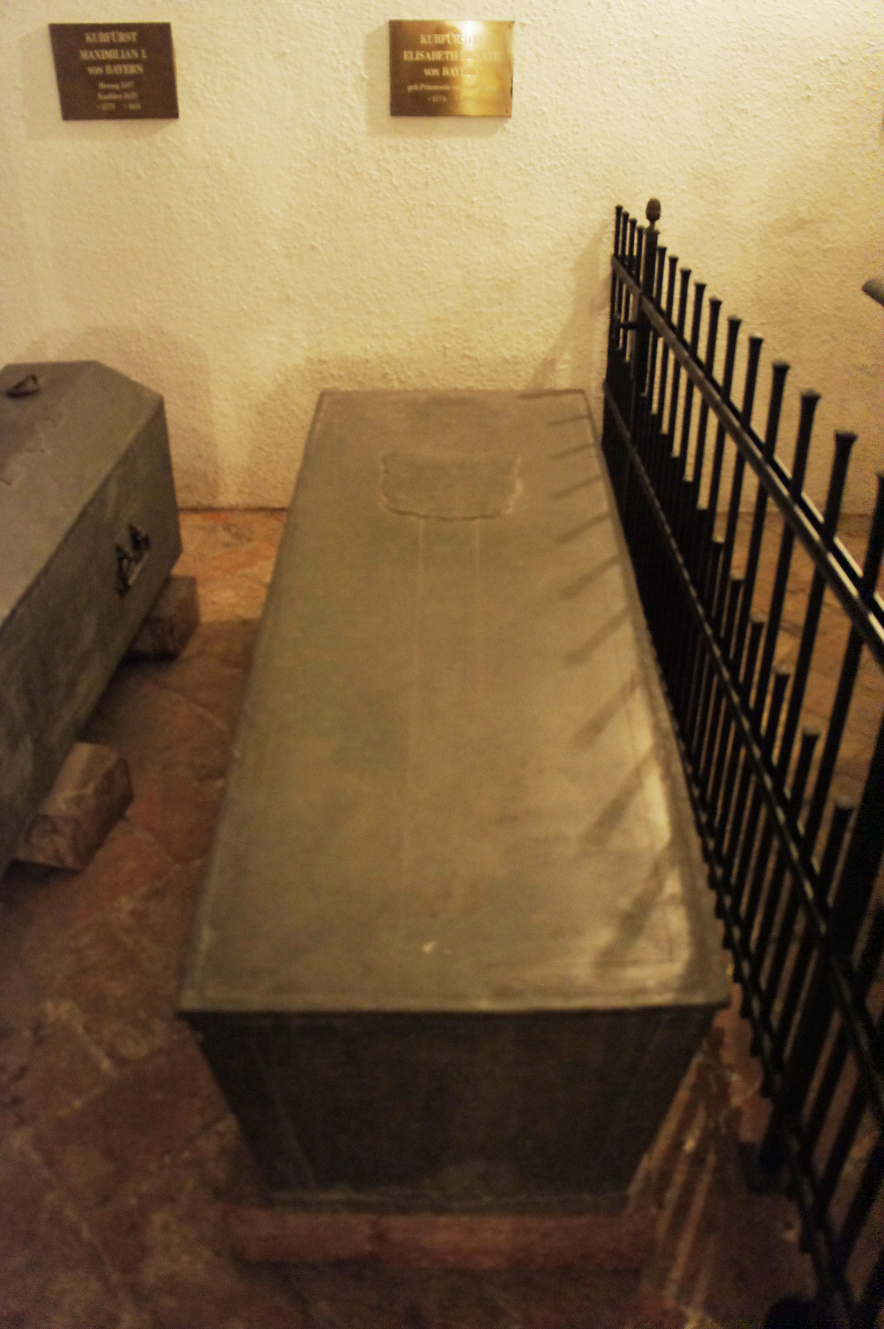 Elisabeth Renata von Lothringen, Kurfürstin von Bayern (9. Oktober 1574 – 4. Januar 1635) (erste Gemahlin von Kurfürst Maximilian I.). Sarkophag in der Grablege der Wittelsbacher in der St. Michael Kirche in München.